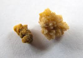 Kristalezko harriek ureterra oztopatu eta mina eragiten dute